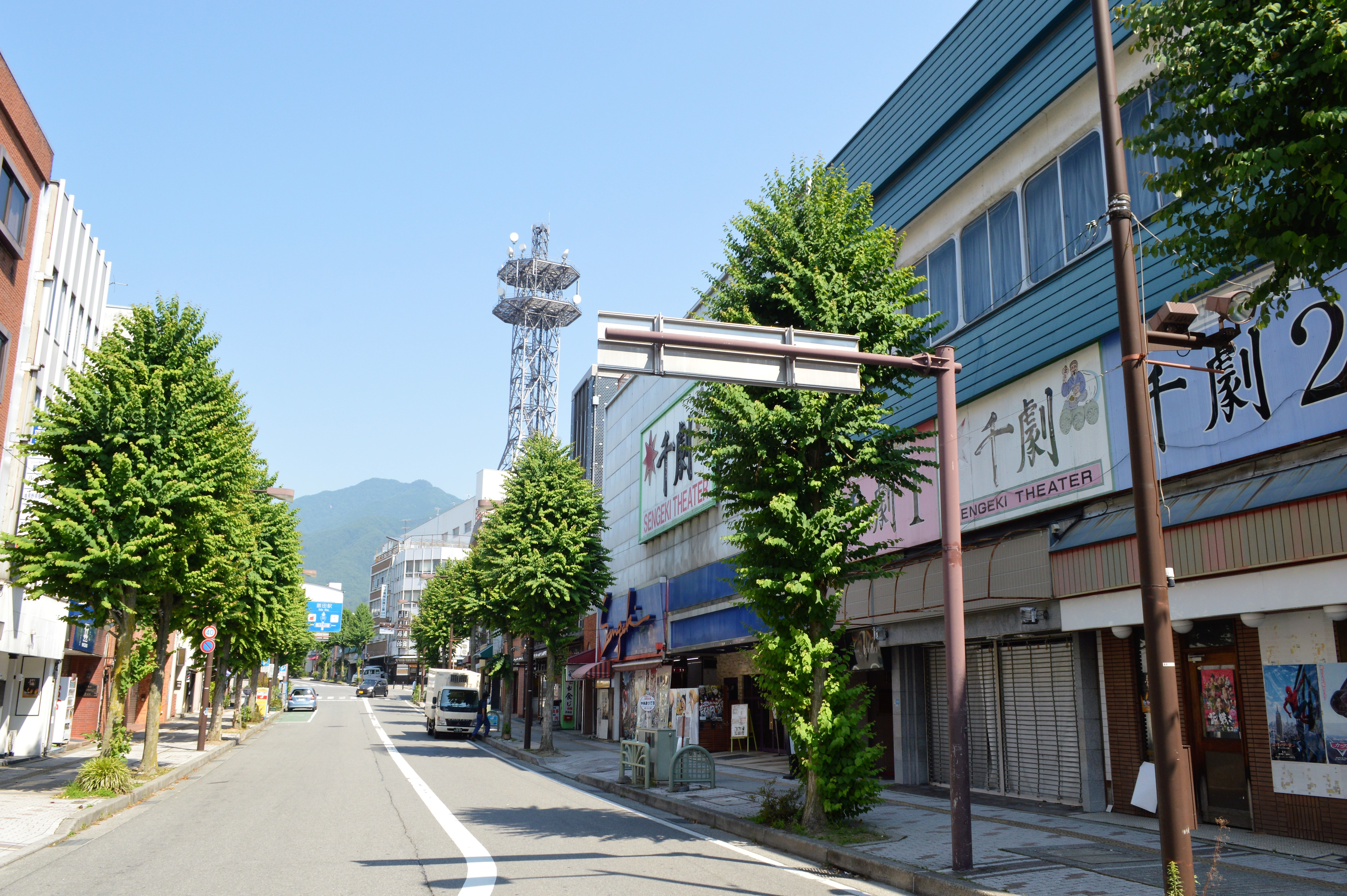 長野県飯田市の映画館「飯田センゲキシネマズ」。